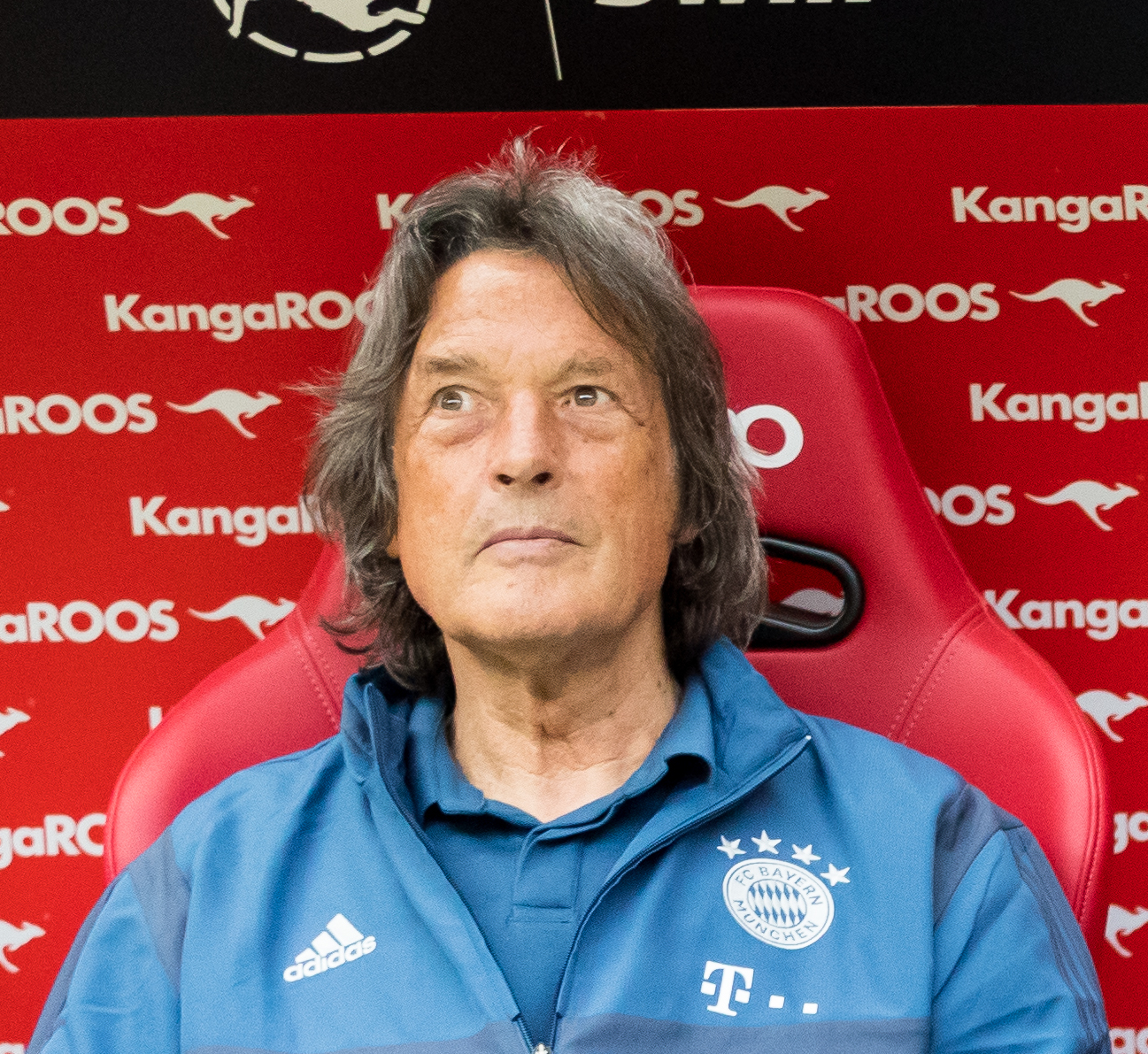 during 1.FC Kaiserslautern vs FC Bayern München at Fritz-Walter-Stadion, Kaiserslautern, Rheinland-Pfalz, Germany on 2019-05-27, Photo: Sven Mandel